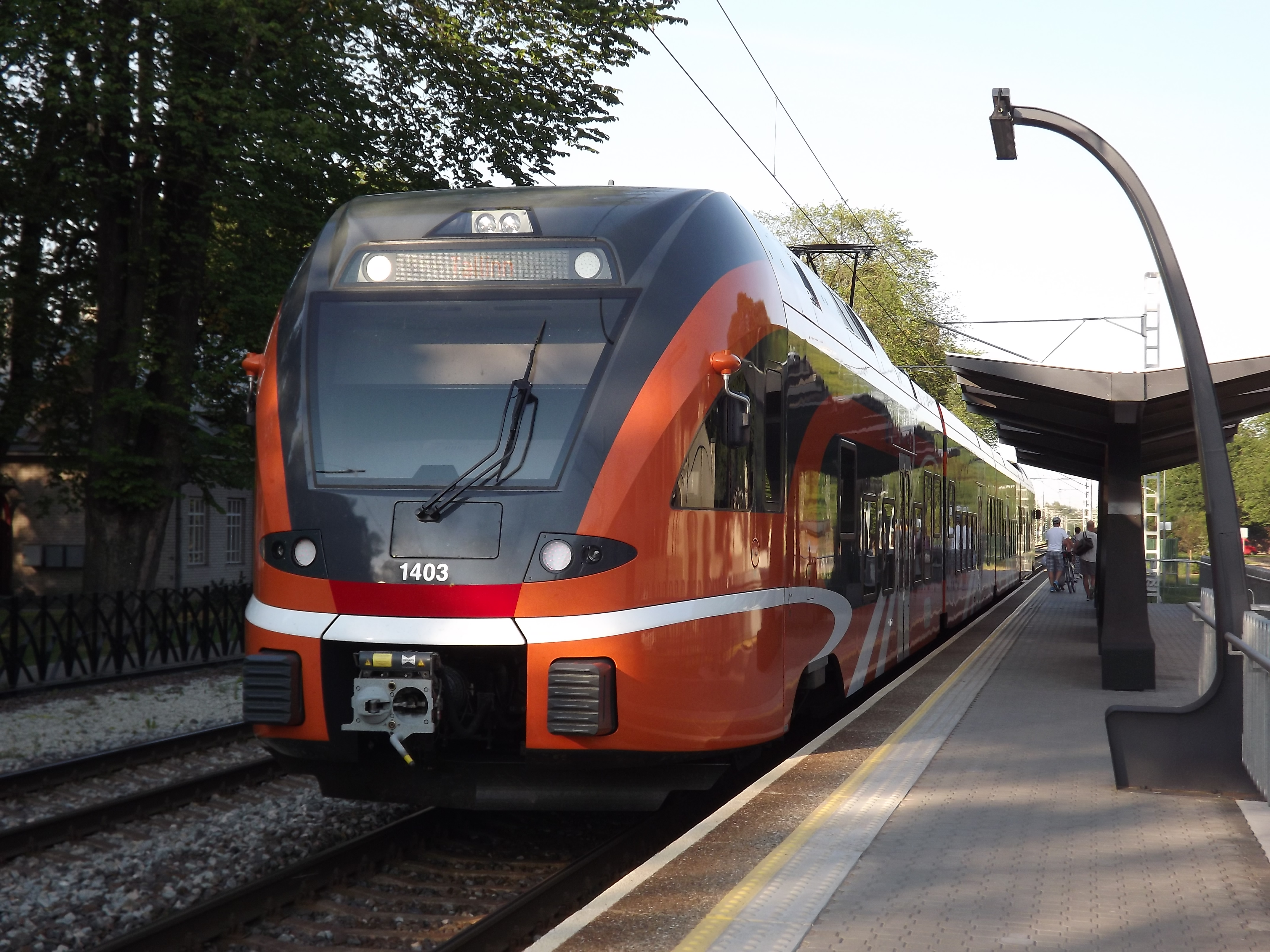 Elektrirong Stadler FLIRT EMU 1403 "Lendav Läänlane" Nõmmel.